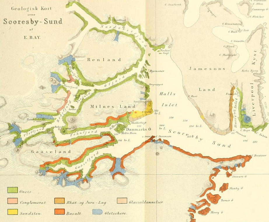 Geologische Karte des Scoresbysunds von Edvard Bay, ein Ergebnis der Ostgrönland-Expedition von Carl Ryder 1891/92.